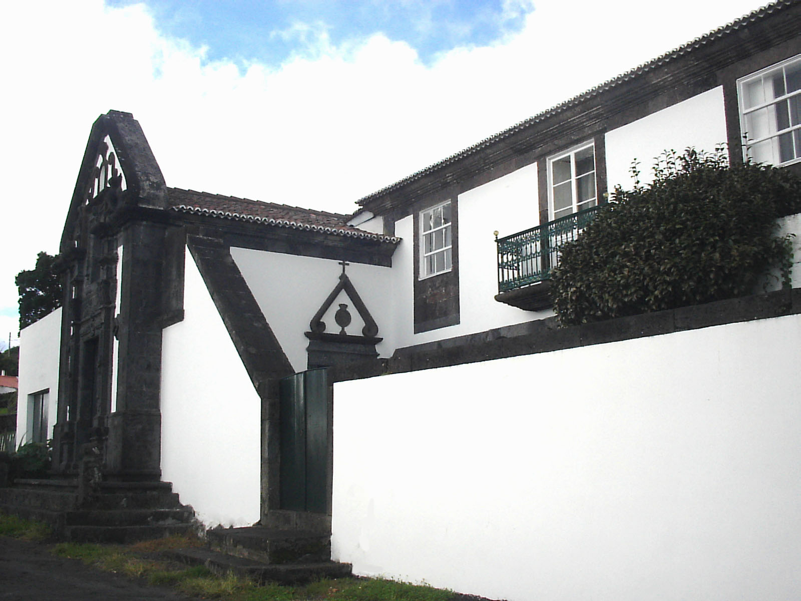 Solar da Família Noronha na ilha de São Jorge, fachada voltada à estrada, Ribeira Seca, Calheta, ilha de São Jorge, Açores, Portugal